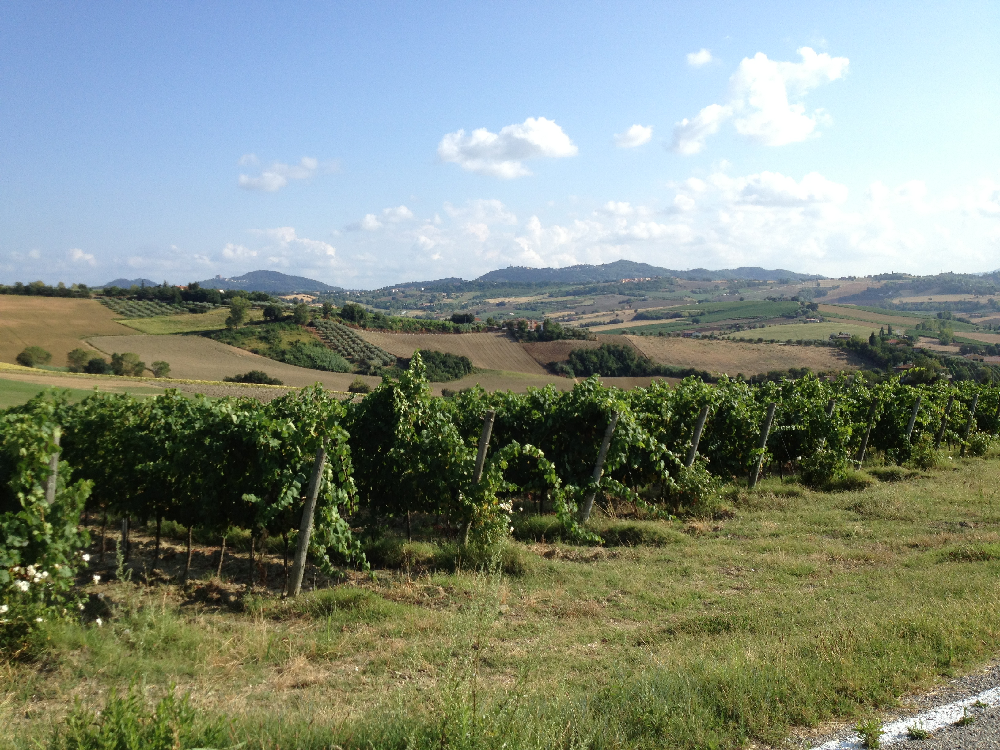 Campagna di Coriano